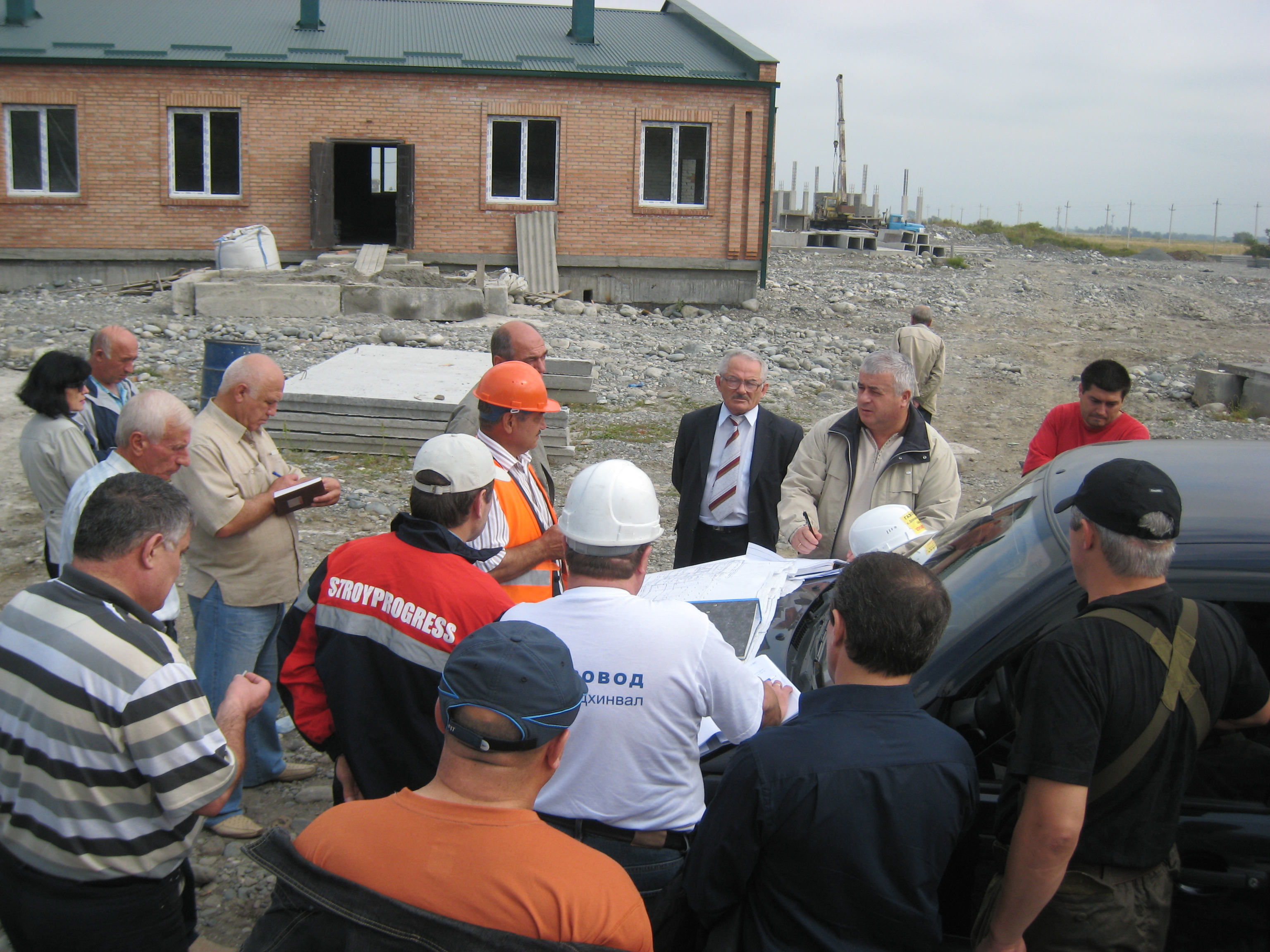 На стройке газопровода Дзуарикау-Цхинвал